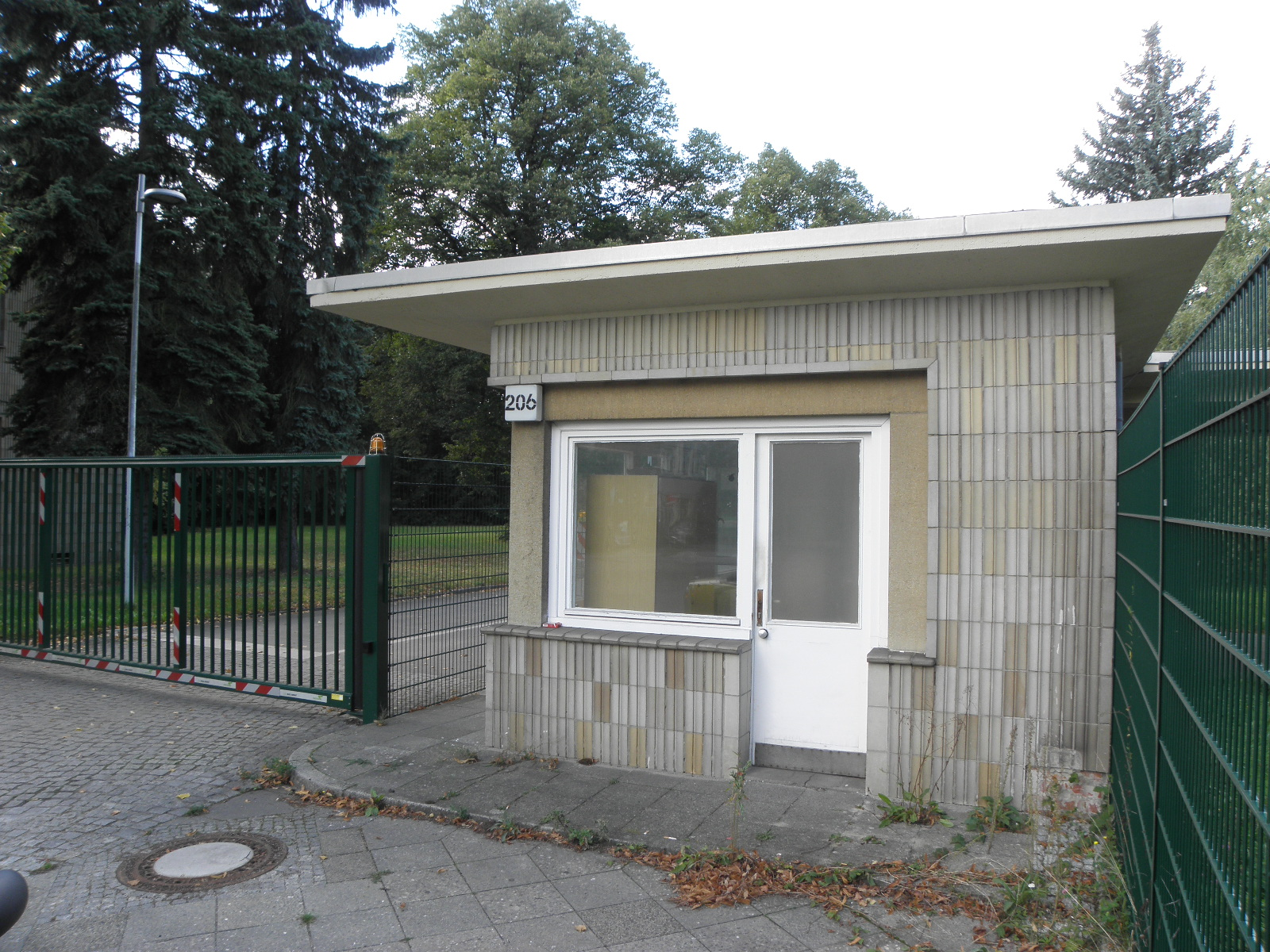 Pionierstraße, Wasserwerk Spandau, histor. Pförtnerhaus